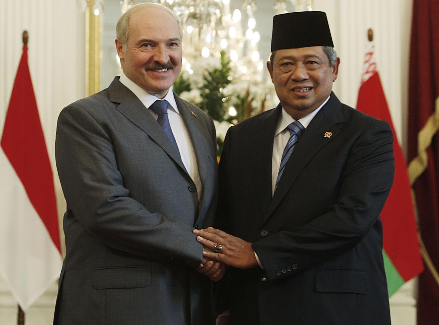 Presiden SBY menerima kunjungan kenegaraan Presiden Belarus Alexander Lukashenko di Istana Merdeka, 19 Maret 2013.